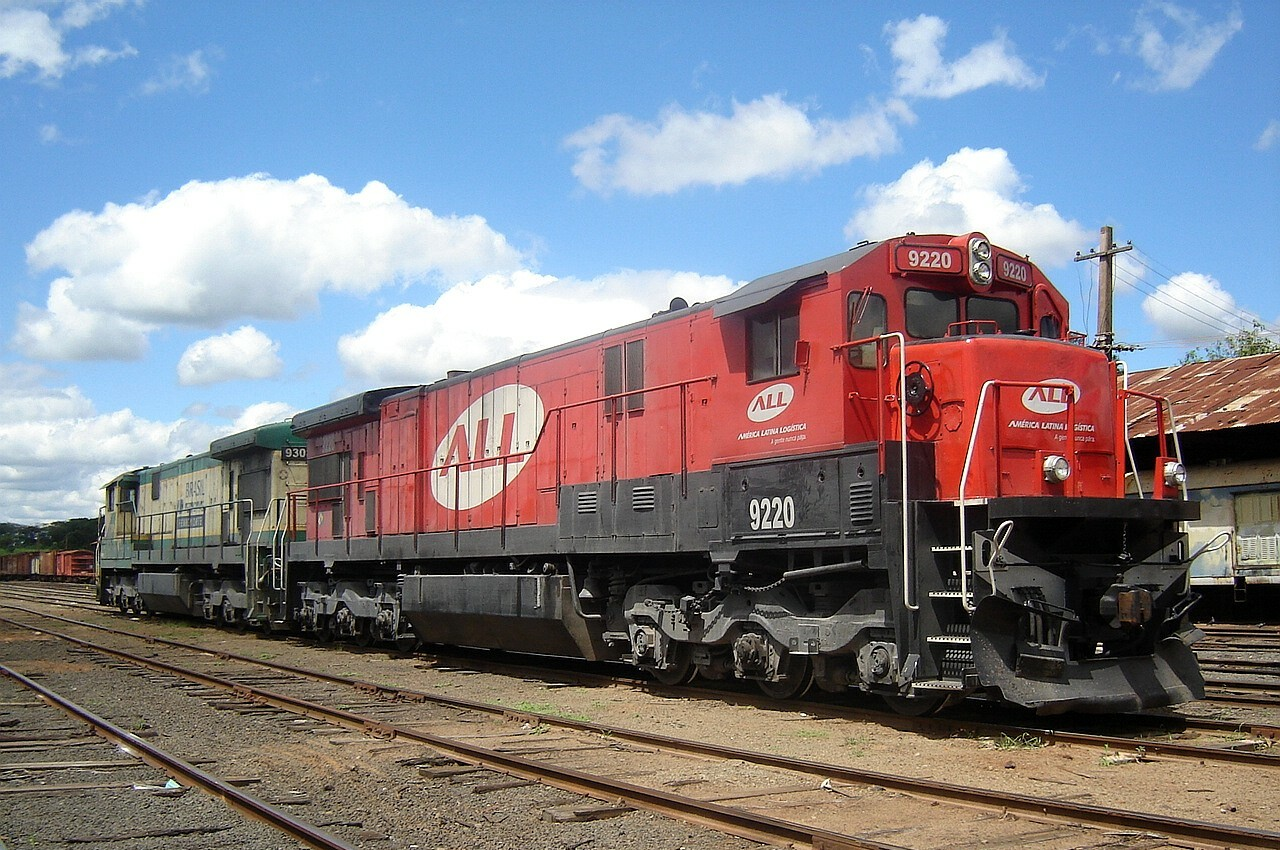 ALL 9220, GE C30-7 Triagem Paulista, Bauru-SP-Brasil